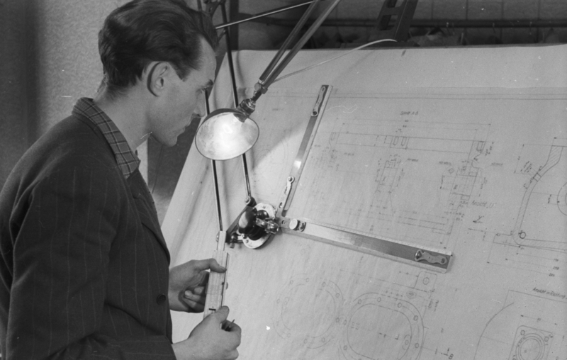 Zentralbild Biscan Ne-Zu. 4.11.1952 Jeder nach seinen Fähigkeiten - jedem nach seinen Leistungen: Am 28. Juni wurde auf Initiative des Politbüros der SED von der Regierung der Deutschen Demokratischen Republik der Beschluss über die Erhöhung der Löhne und Gehälter für Arbeiter, Meister und Angehörige der wissenschaftlich - technischen Intelligenzberufe gefasst. Dieser Beschluss ist von grosser Wichtigkeit, weil er in der Entlohnung eine Etappe einleitet, in der das Prinzip der Lohn -und Gehaltspolitik "Jeder nach seinen Fähigkeiten - jedem nach seinen Leistungen" durchgeführt wird. Die Arbeiter, Meister und Angehörigen der technischen und wissenschaftlichen Intelligenzberufe antworten auf den Beschluss der Regierung mit einer noch grösseren Wettbewerbsbewegung, Steigerung der Arbeitsproduktivität, mit neuen Erfindungen und Forschungsergebnissen, was zu einer weiteren Entwicklung der volkseigenen Wirtschaft und zur Verbesserung der materiellen Lage der Werktätigen führt.UBz: Ingenieur H[...*] L[...*] ist Konstrukteur für Kühlmaschinen in den volkseigenen Maschinen- und Apparatebauwerken MAM, Magdeburg, und bekommt jetzt aufgrund der Verordnung über die Erhöhung der Gehälter der Angehörigen der technischen Intelligenz 68% mehr als früher. Er ist stolz darauf, dass seine Arbeit eine solche Anerkennung fand. Mit noch grösserem Eifer geht er an die Lösung der neuen Aufgaben heran. (siehe Bild 4) [*BArch: Name aus Gründen des Persönlichkeitsrechts anonymisiert]